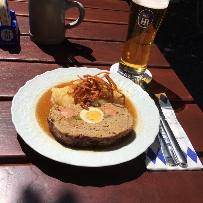 Stefaniebraten , Wiener Hofbräuhaus 2017